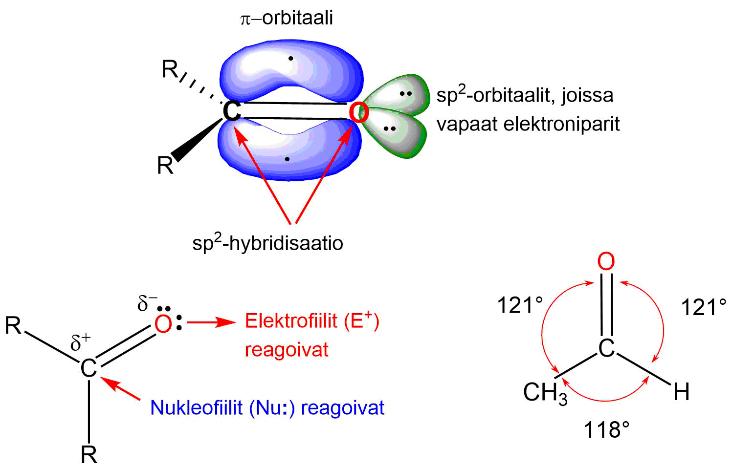 Karbonyyliryhmän hiili- ja happiatomilla on sp2-hybridisaatioja sen kaksoissidos on muodostunut sp2-orbitaalien muodostamasta sigma-sidoksesta ja p-orbitaalien muodostamasta pii-sidoksesta. Hiiliatomista lähtee kolme samaan tasoon suuntautuvaa sidosta, joiden sidoskulma on n. 120°. Karbonyyliryhmä on poolinen, jolloin se reagoi sekä elektrofiilien että nukleofiilien kanssa.